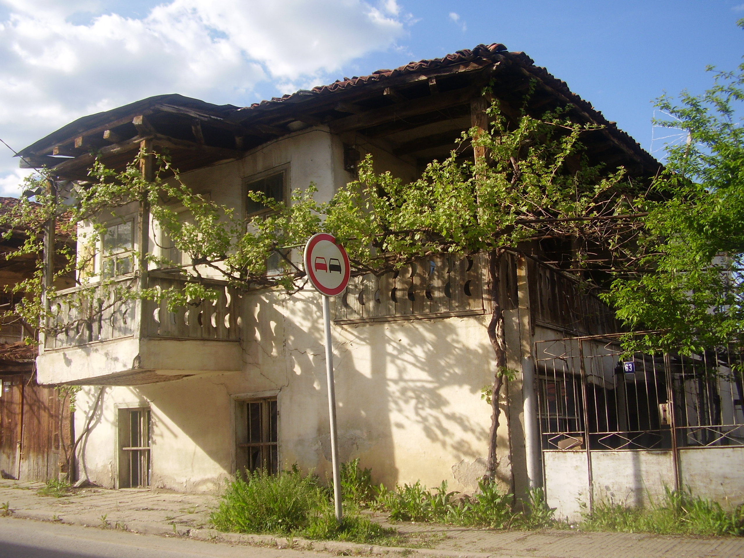 с.Соволяно